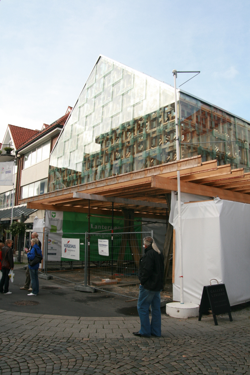 Lanternen en uke før åpningen